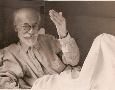 Voline sur lit à la fin de sa vie (?)